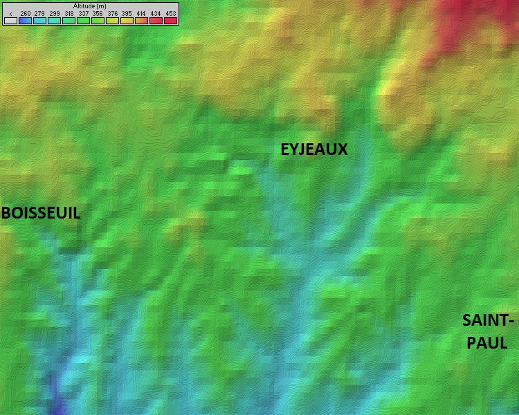 Topographie d'Eyjeaux Image topographique avec position des communes réalisée avec le logiciel Radio Mobile (6,5km de côté).